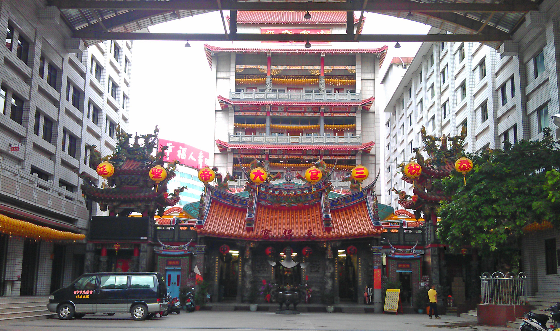 中文（台灣）: 台中元保宮正殿